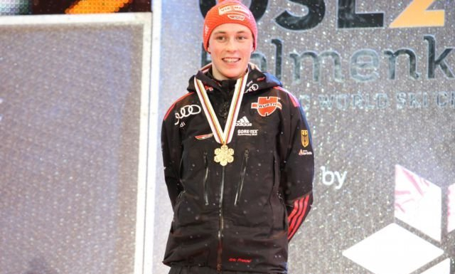 Eric Frenzel podczas ceremonii medalowej po konkursie indywidualnym (Gundersen - skok na obiekcie HS106 + bieg na 10 kilometrów) w ramach Mistrzostw Świata w Narciarstwie Klasycznym 2011 w Oslo.